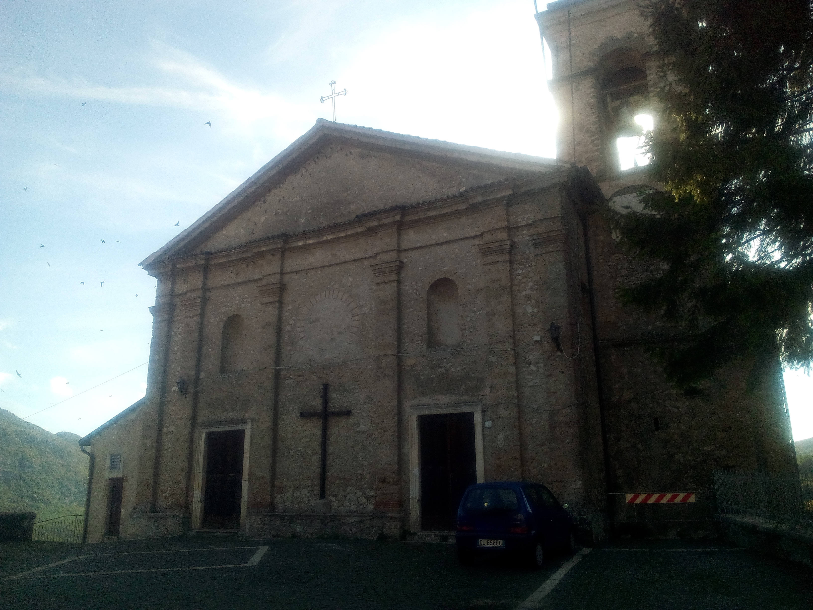 Facciata della chiesa di San Biagio a Cappadocia in Abruzzo